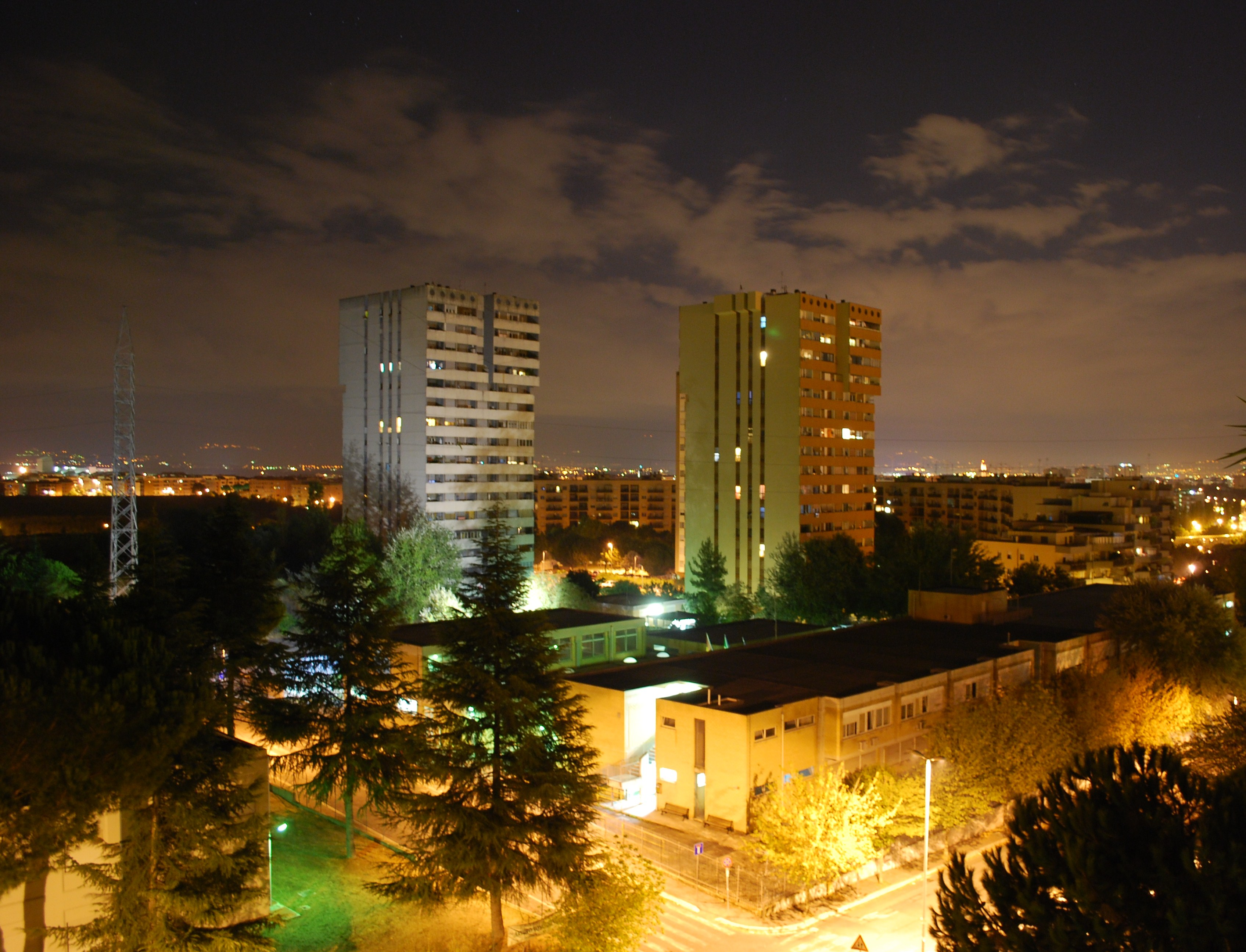 Edifici dei Colli della Serpentara. Foto di Antonino Garufi